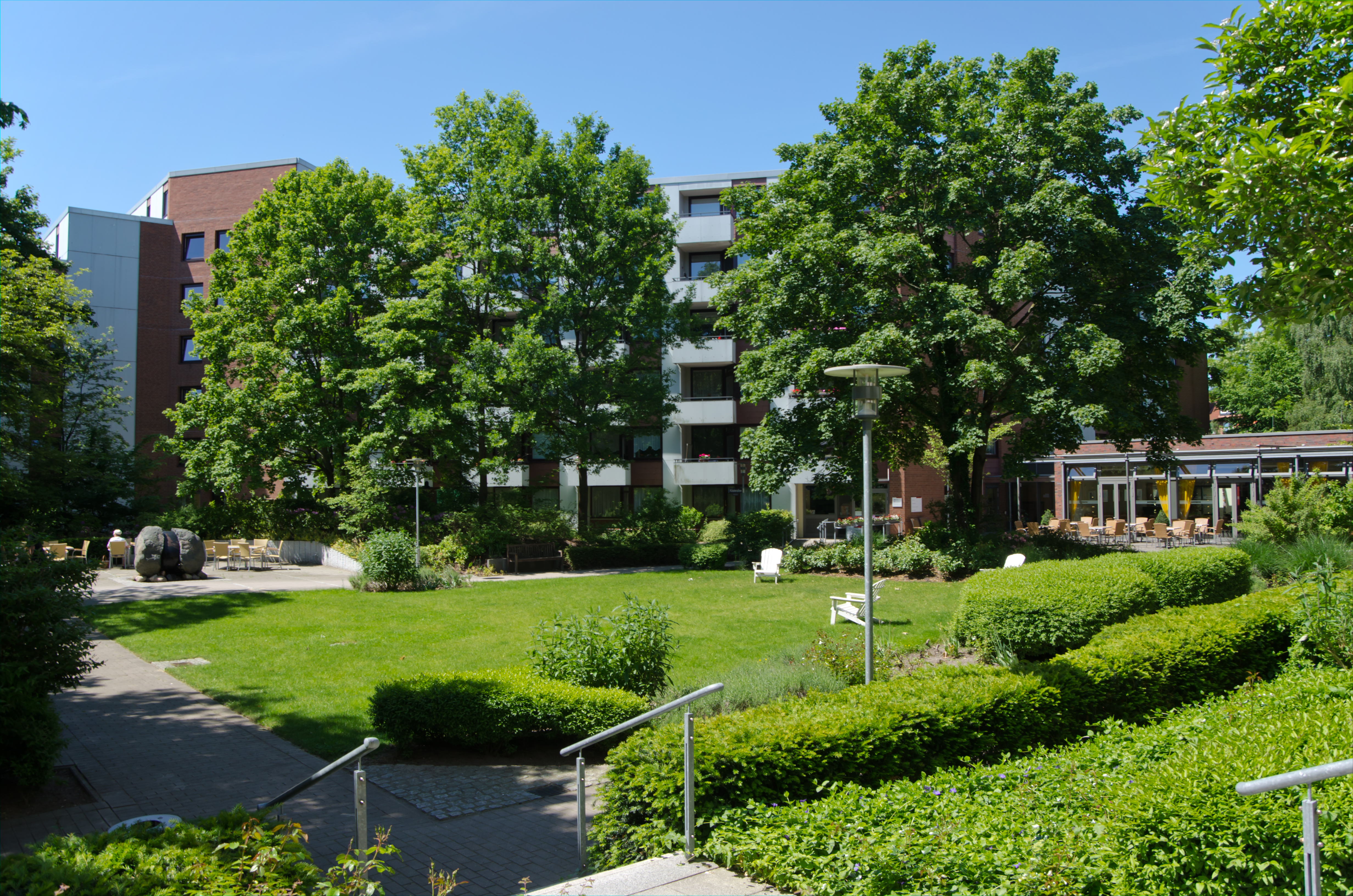 Köster-Stiftung Haus Köster 2 mit Köster-Cafe